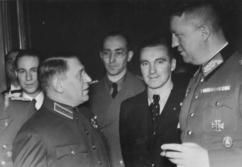 General Purkajew und General Friedrich Fromm General Purkajew, der sowjetrussische Militärbevollmächtigte, im Gespräch mit dem General der Infanterie Fromm (r.). 14418-39 Abgebildete Personen: Fromm, Friedrich: Generaloberst, Ritterkreuz (RK), Heer, Deutschland (GND 118843338) Purkajew, Maxim: General, Militärbevollmächtigter, Sowjetunion